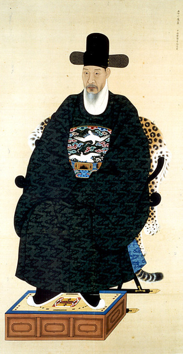 김재로 영정 (인천광역시 유형문화재 제10호)